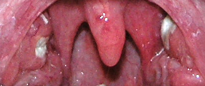 Bilaterale Tonsillitis